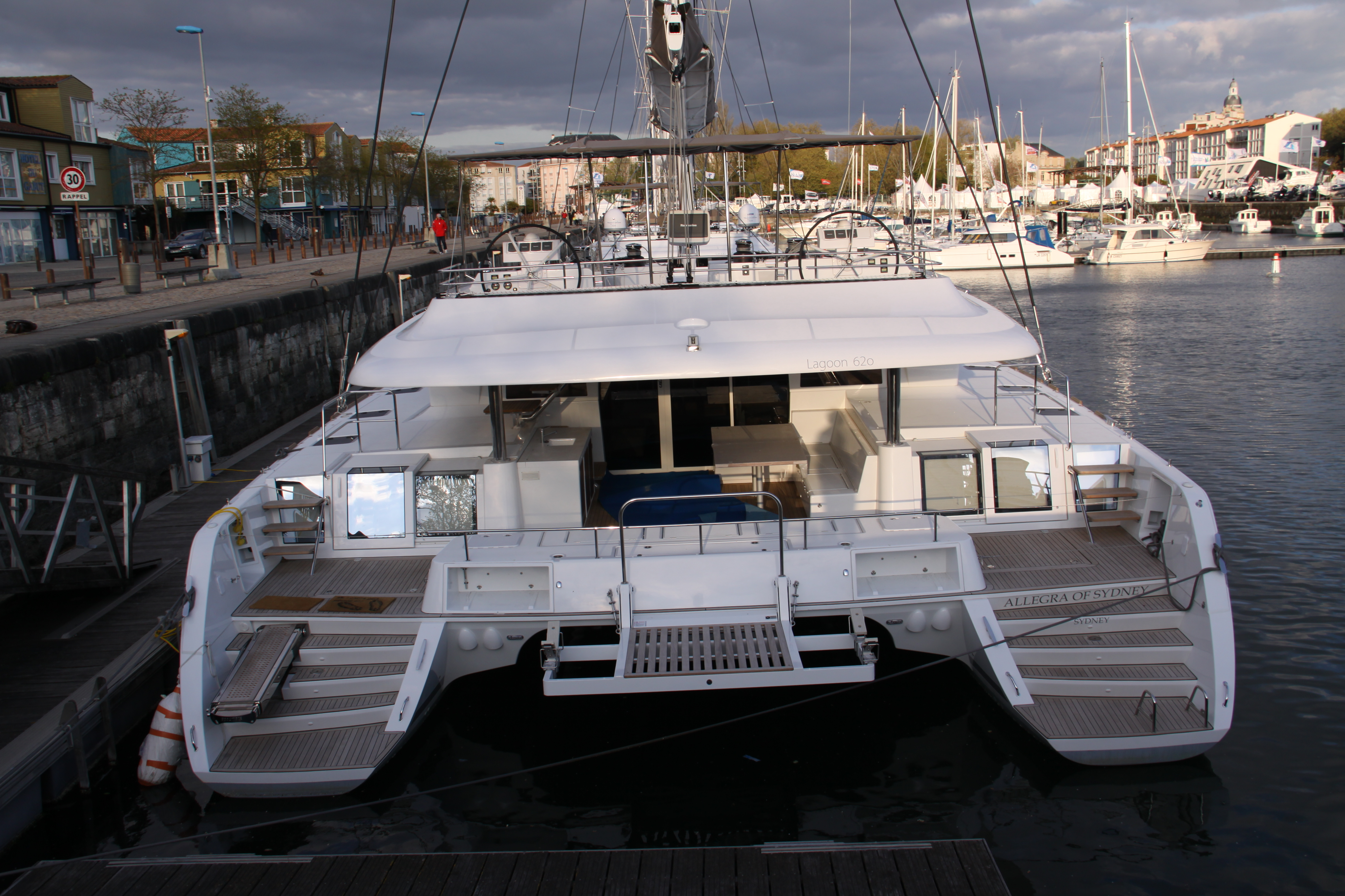 L' arrière d'un catamaran de croisière Lagoon 620 sans le canot de sauvetage. La Rochelle (Bassin des Chalutiers), Charente Maritime, France.